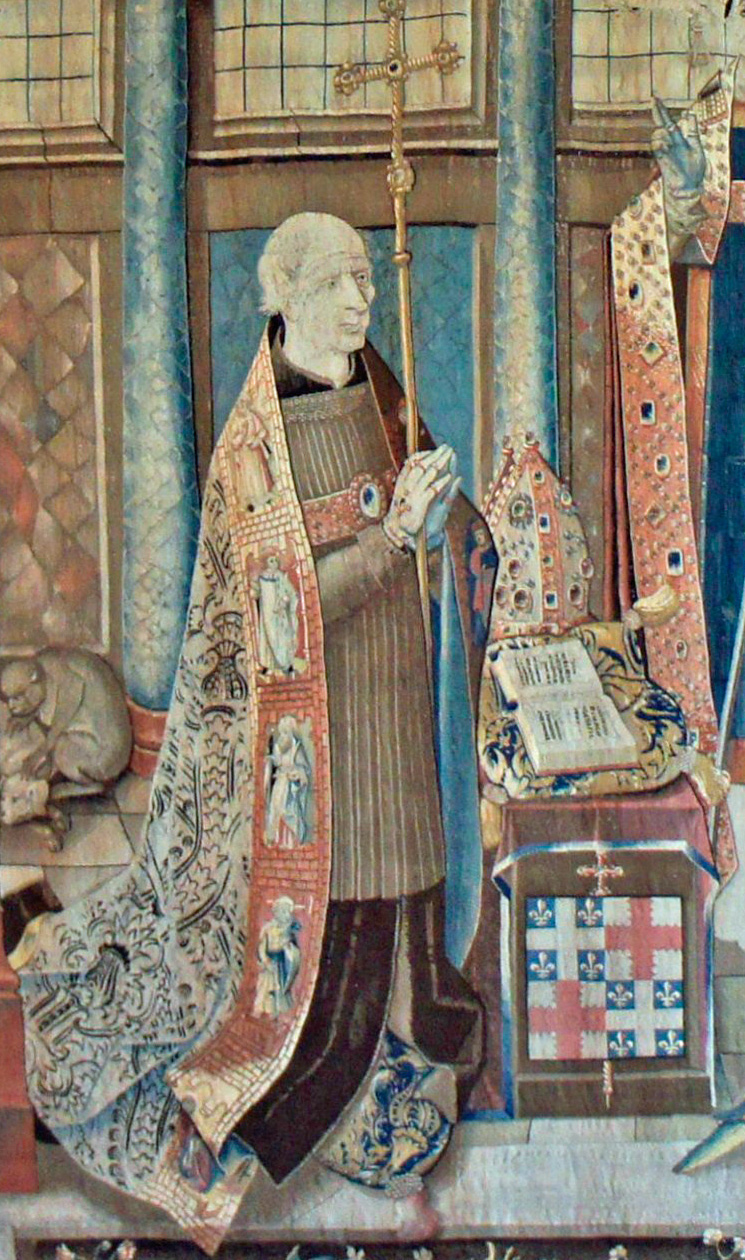 Le cardinal de Reims, Robert de Lenoncourt.